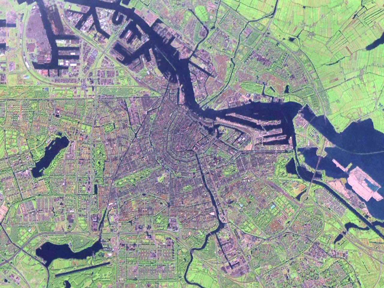 Amsterdam